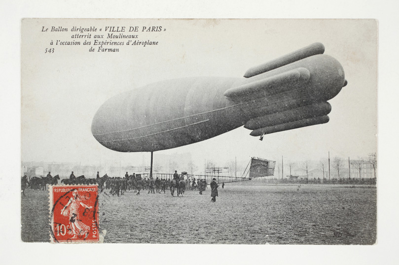 Le Ballon dirigeable "Ville de Paris" atterrit aux Moulineaux à l'occasion des Expérience d'Aéroplane de Farman Les hangars à dirigeables Éditeur: ND Phot Adresse actuelle : 40 rue Henry Farman Paris Date : 1910